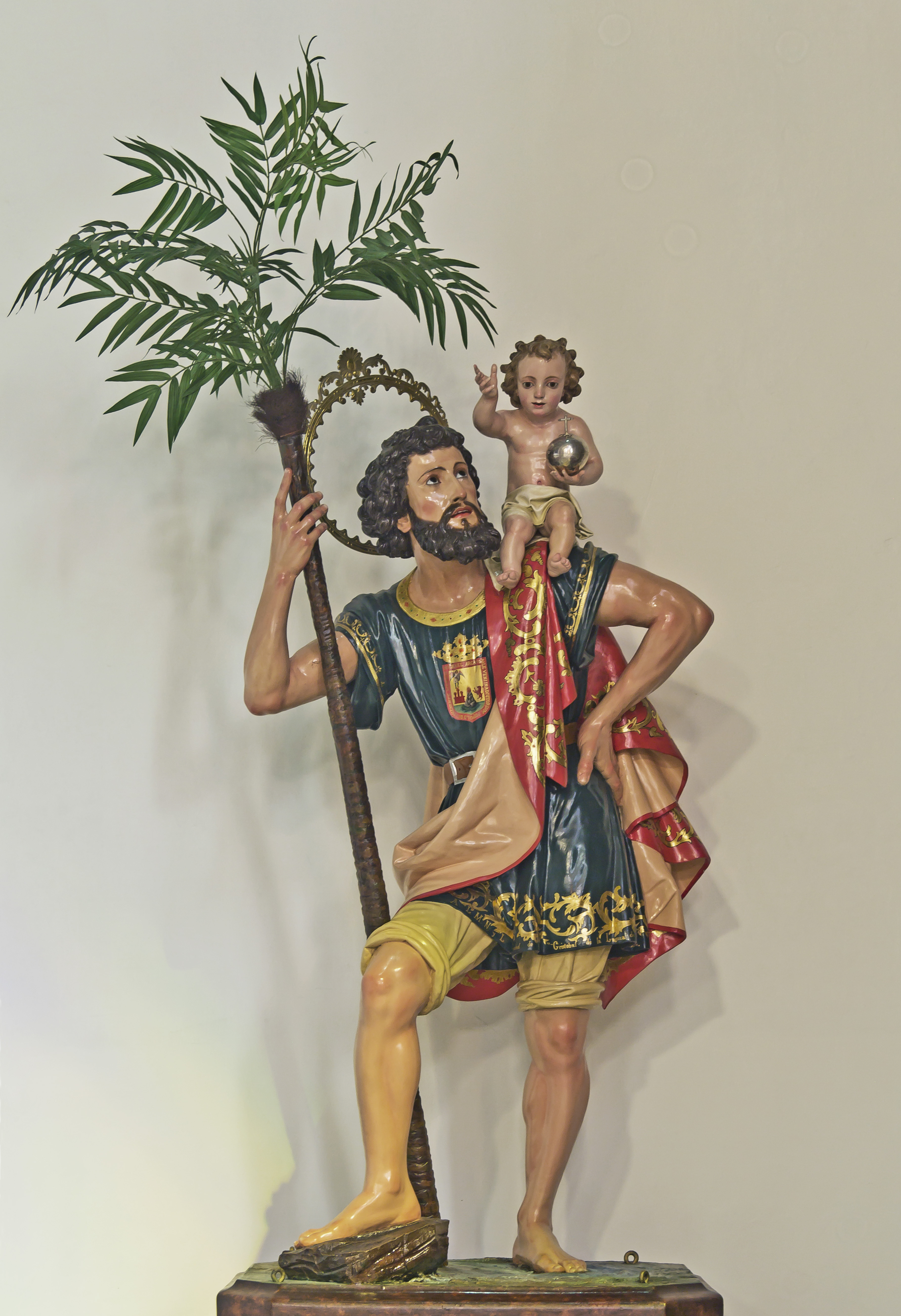 Figur eines Christophorus in der Kathedrale von La Laguna